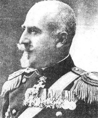 Портрет на Петър Тантилов